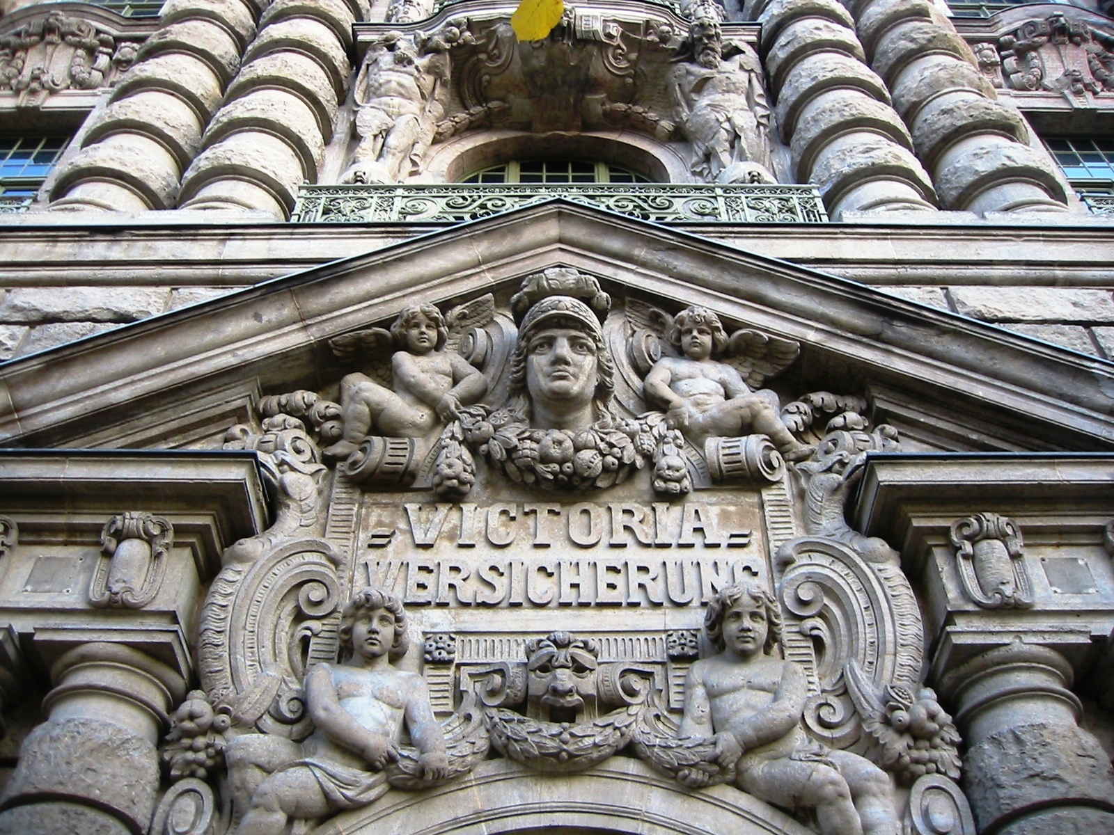 Gebäude der ehemaligen Viktoria-Versicherung in der Lindenstraße in Berlin-Kreuzberg: Mittelrisalit über dem Eingangsportal